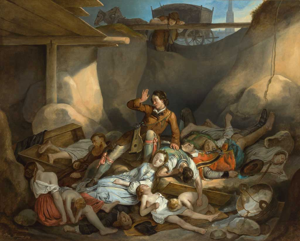 Der liebe Augustin erwacht in der Pestgrube. Im Hintergrund der Stephansdom. Signiert und 1841 datiert. Öl auf Leinwand. 114 x 142 cm